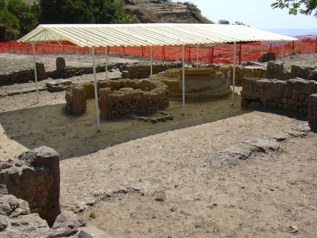 Morgantina: Santuario dell'agorà dedicato alle divinià ctonie,l'area sacra è caratterizzata da un altare cilindrico e un botros.